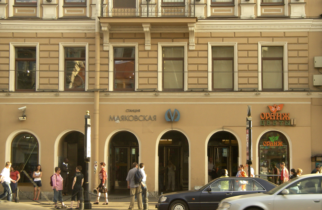 Станция метро Маяковская (Санкт-Петербург), вид с Невского Проспекта.